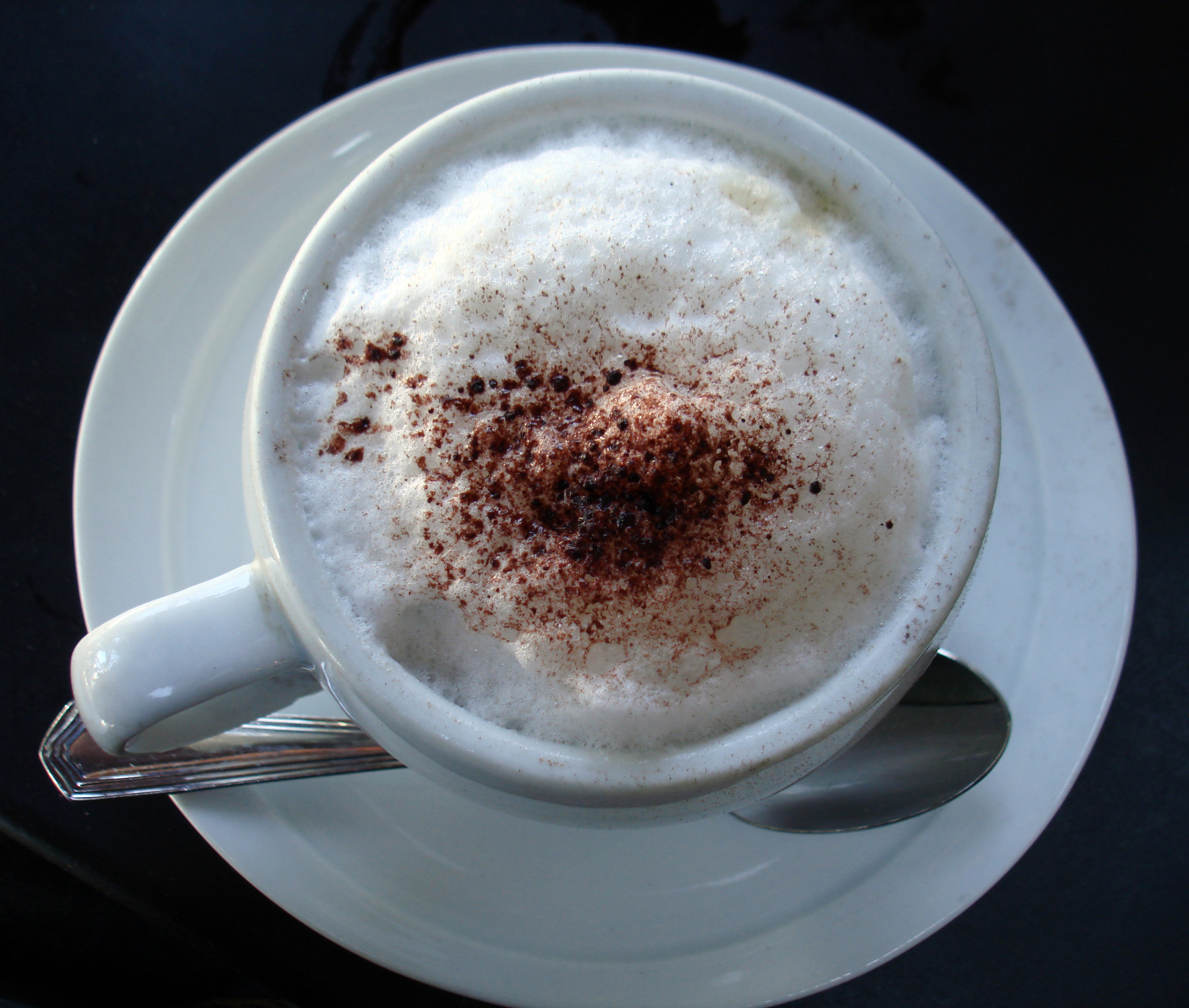 Foam on a cappucino.